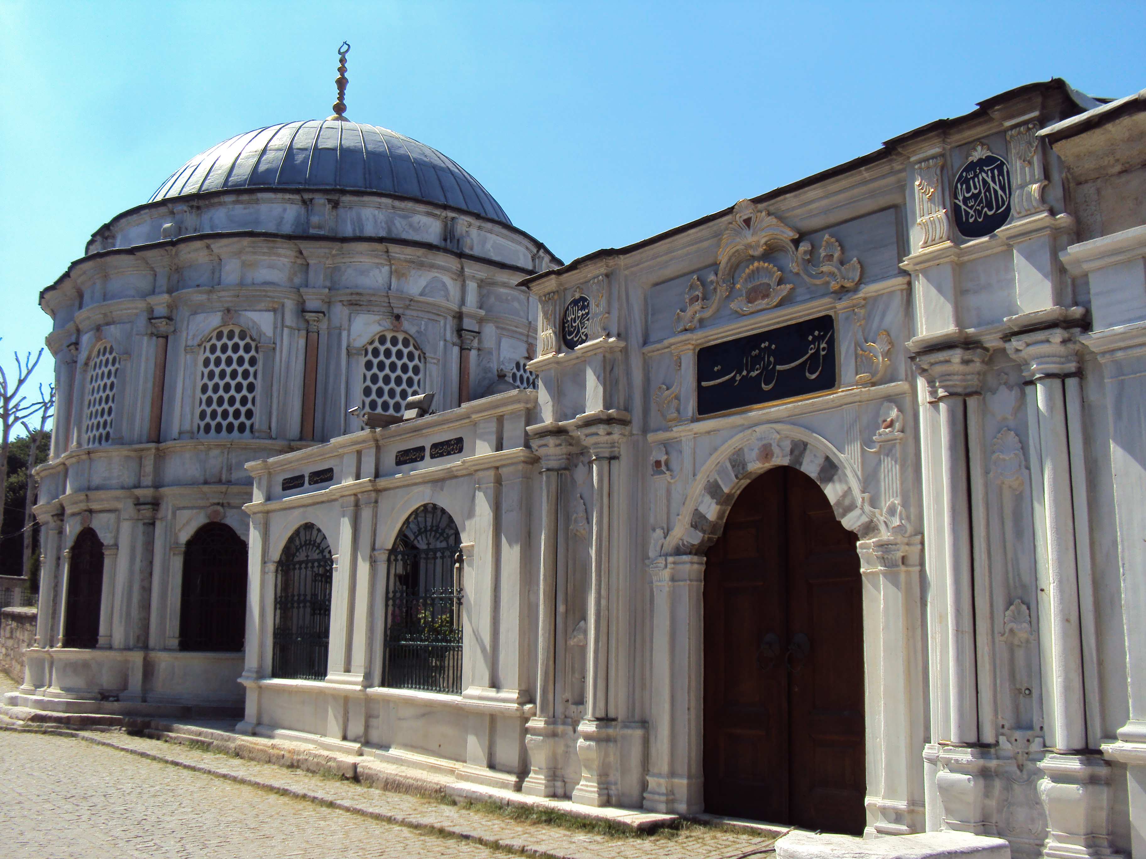 Авар: Истамбулалда Михришах Валиде СултIанил тюрбе